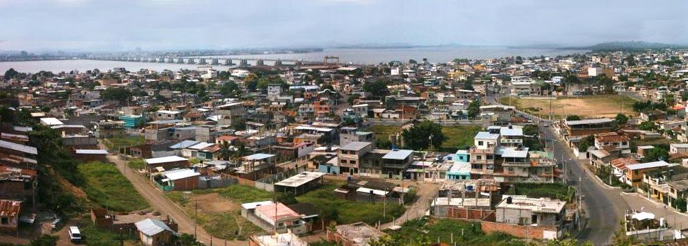 Vista de Eloy Alfaro Durán